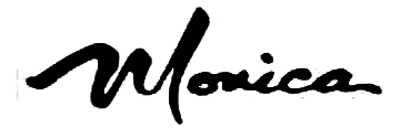 Logotyp för den amerikanska artisten Monica